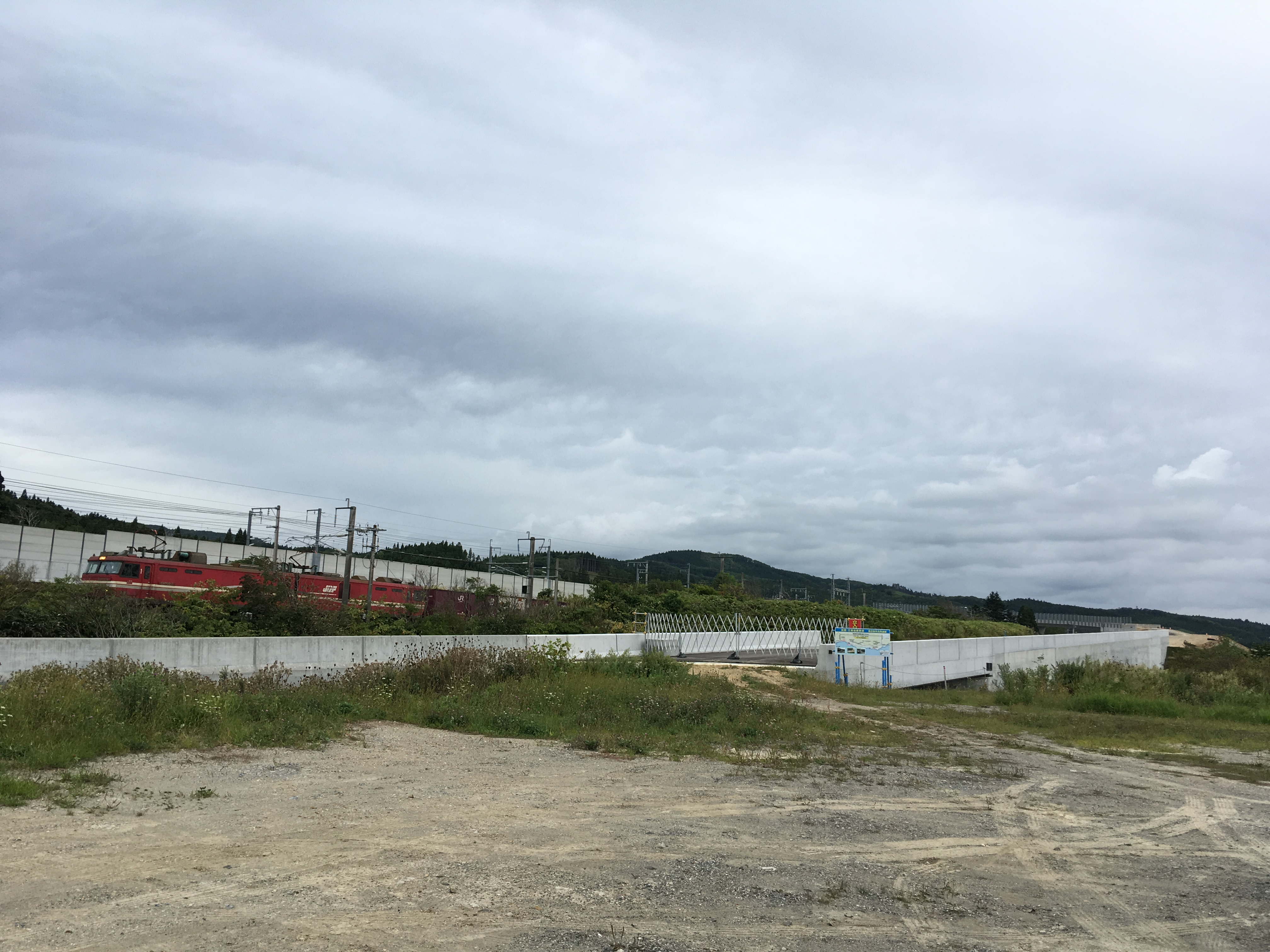 出入口横（写真左側）を道南いさりび鉄道線、及びその奥（写真左端）を北海道新幹線の高架が通る。